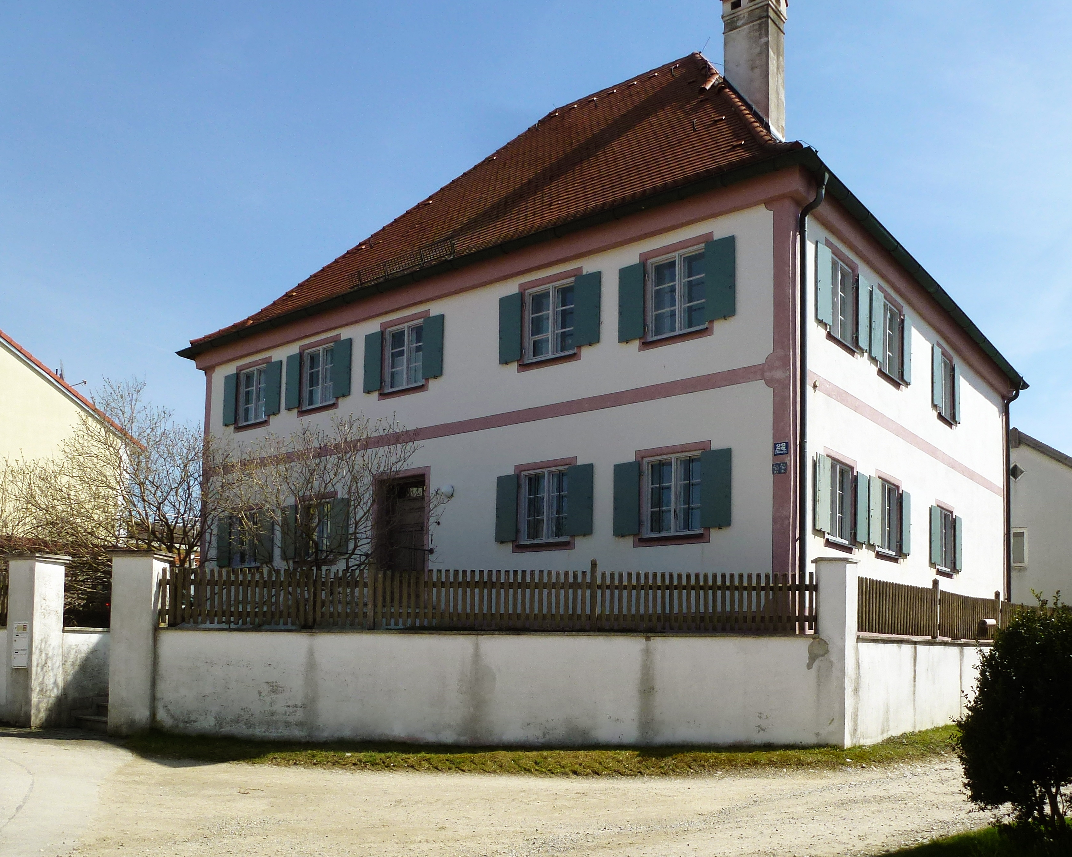 Hausen bei Geltendorf, St Nikolaus Ring 22, Ehemaliges Pfarrhaus. Ansicht von NW